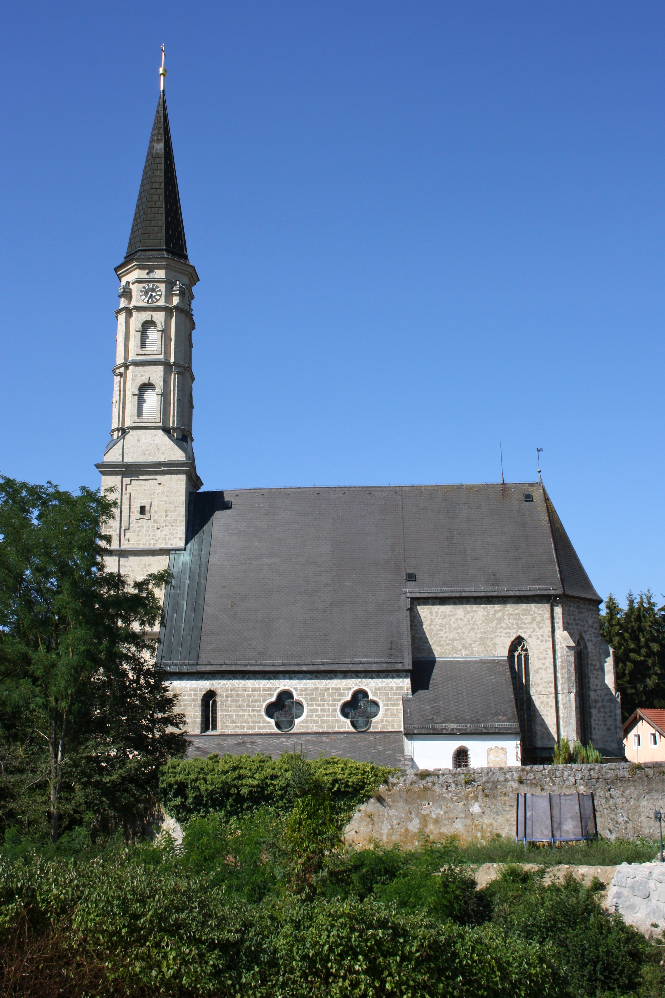 Kath. Pfarrkirche hl. Ägidius und Friedhof